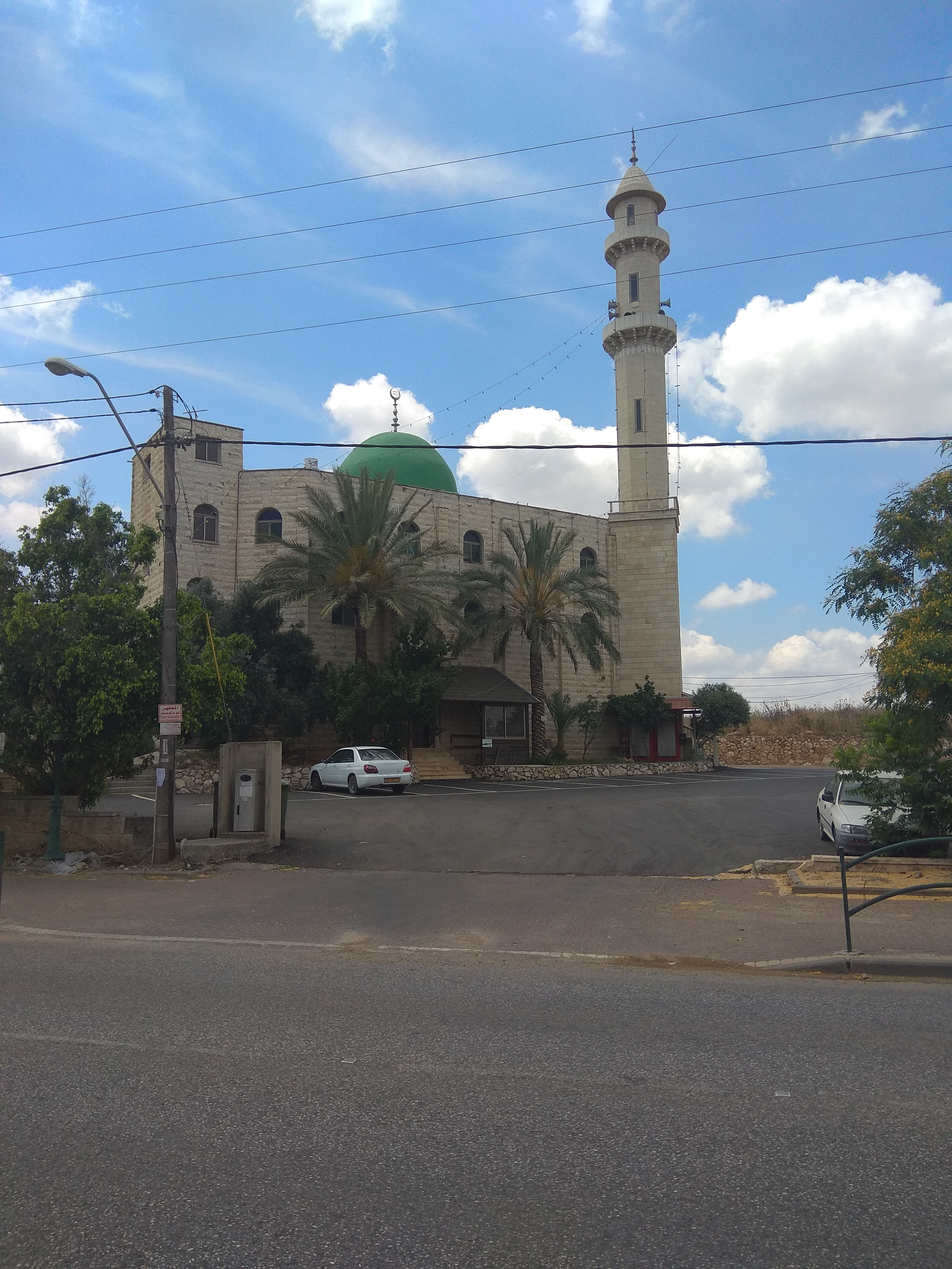 מסגד ביישוב